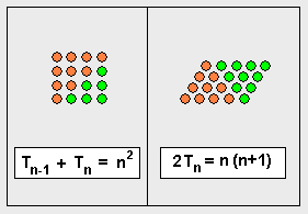 Author: Francisco Javier Blanco González Made by Paint and x2y Se muestra la relación entre los números triangulares, cuadrados y oblongos de los Pitagóricos.